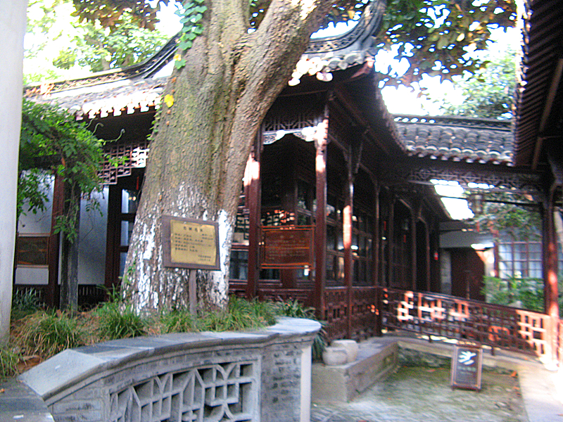 中文（中国大陆）: 江苏省文物保护单位